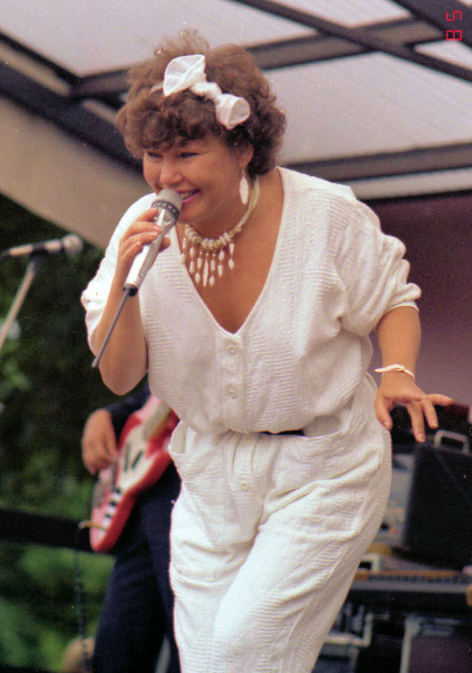 Anita Hirvonen finnish singer